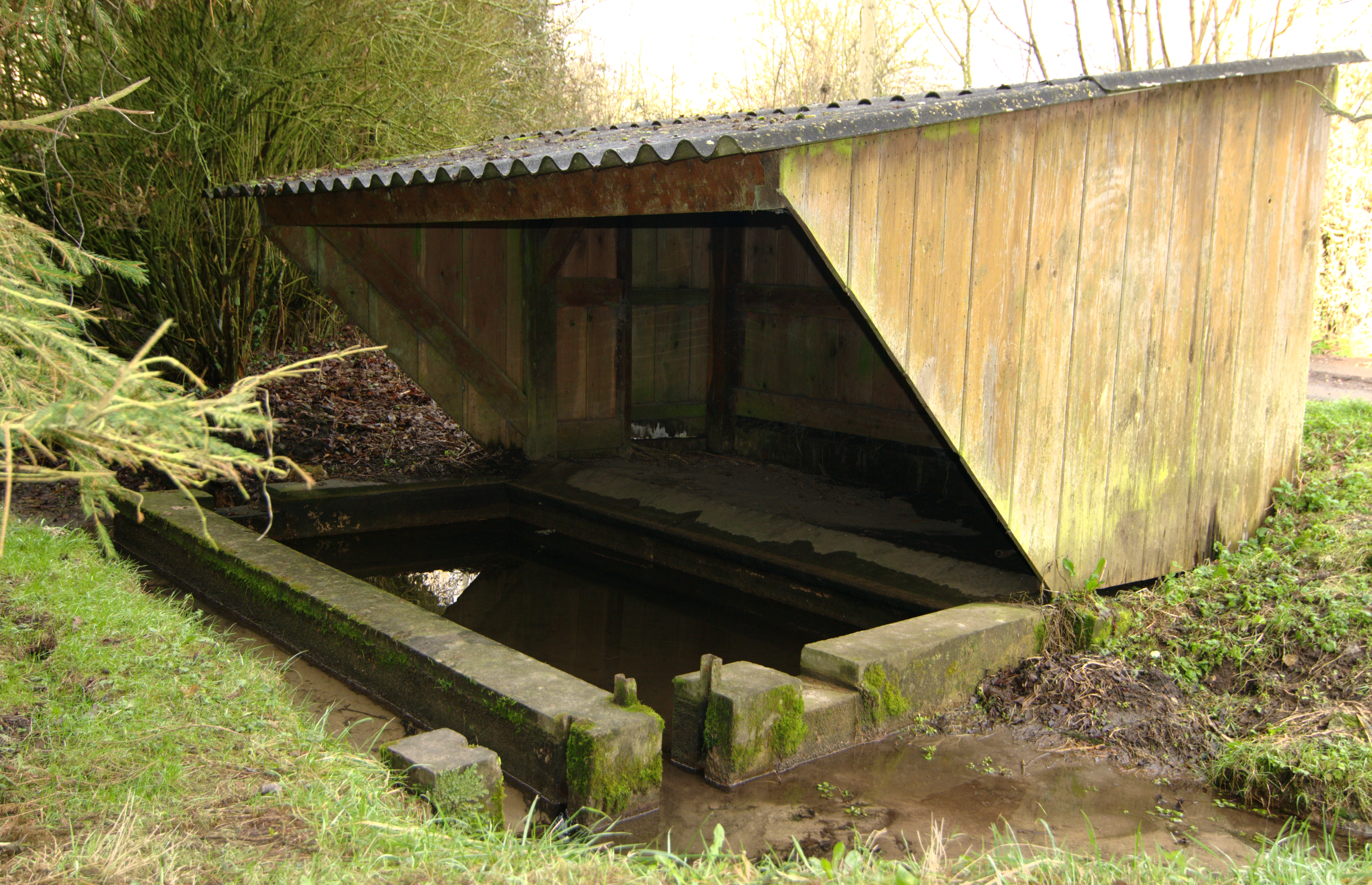 Lavoir situé au lieu-dit Houay, commune de Ri, Orne.